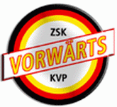 Logo ZSK Vorwärts KVP Berlin